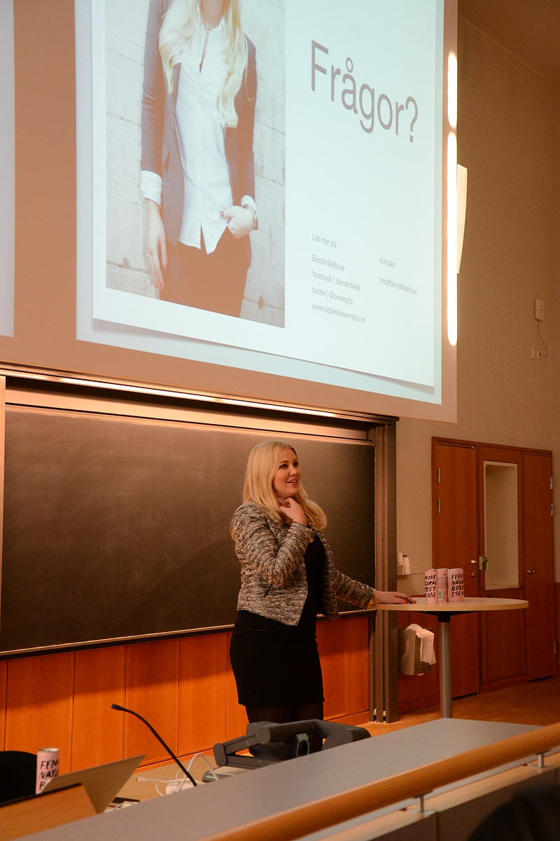 User:Janwikifoto/template pic-bloggers Isabella Löwengrip vid föreläsning på Tekniska Högskolan, Stockholm